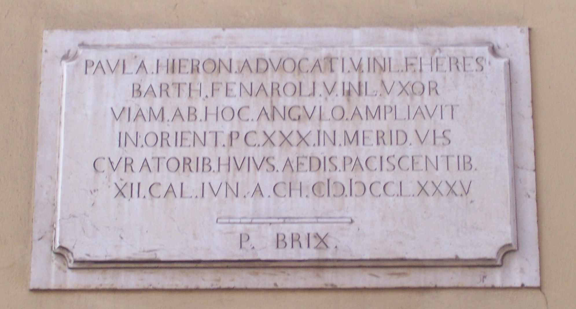 Sant'alessandro (Brescia). Lapide del 1785 che ricorda i lavori di allargamento della strata prospiciente.